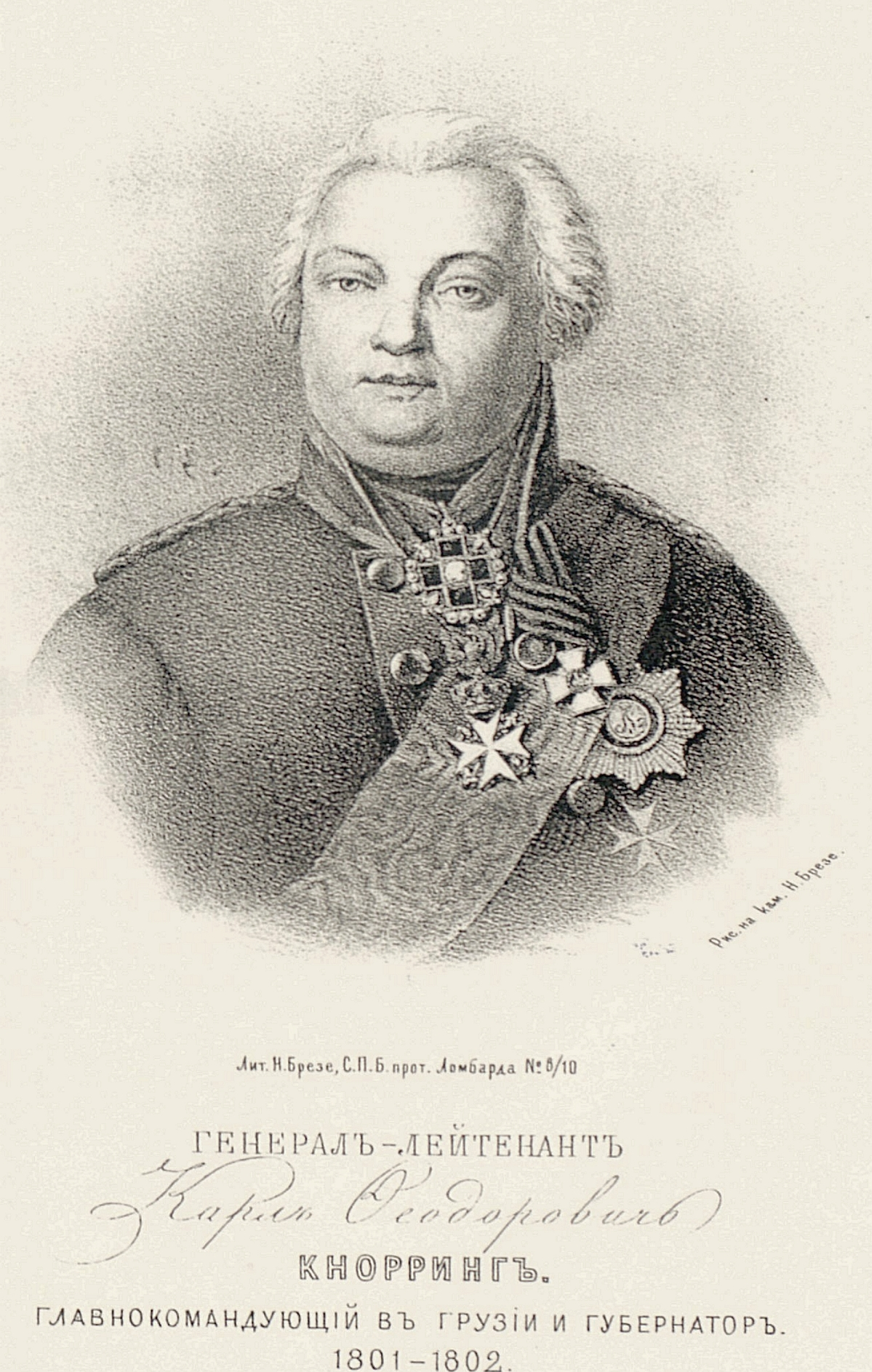 Gravure du général baron Karl von Knorring (1746-1820) de 1865 parue dans le Calendrier du Caucase de la même année.